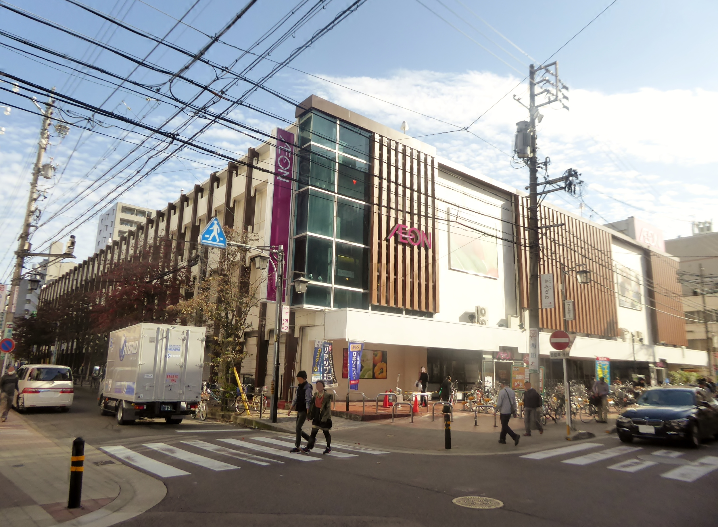 イオン（旧・ダイエー）今池店を撮影。